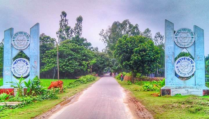 তোরণটি সাদুল্লাপুরে ঢোকার প্রবেশপথ